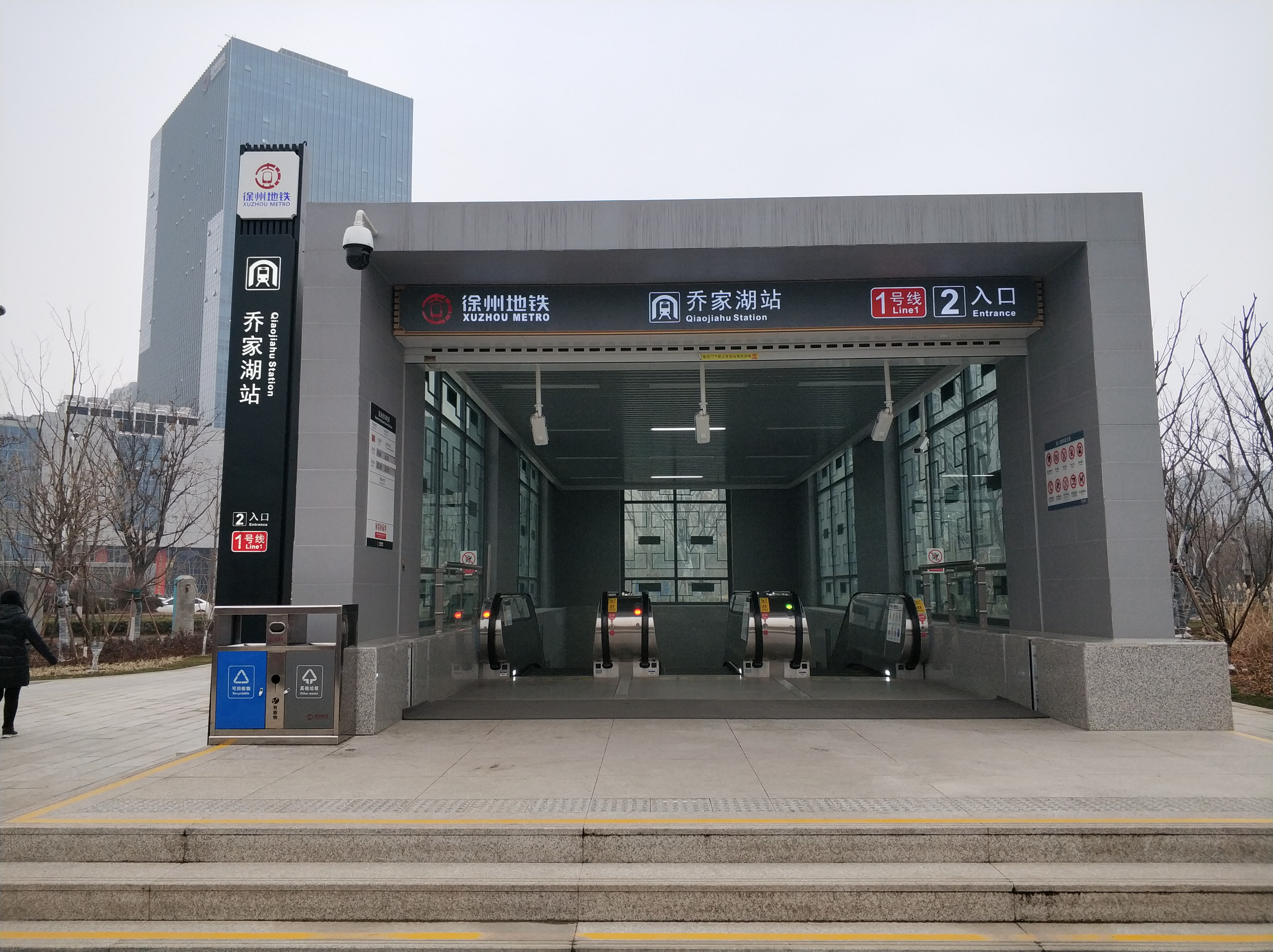 徐州地铁乔家湖站2号出入口，背景高层建筑为徐州地铁大厦，徐州地铁系统的控制中心位于此建筑内。